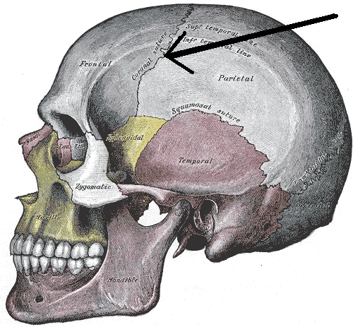 angol wikiből van egy kis módosítással